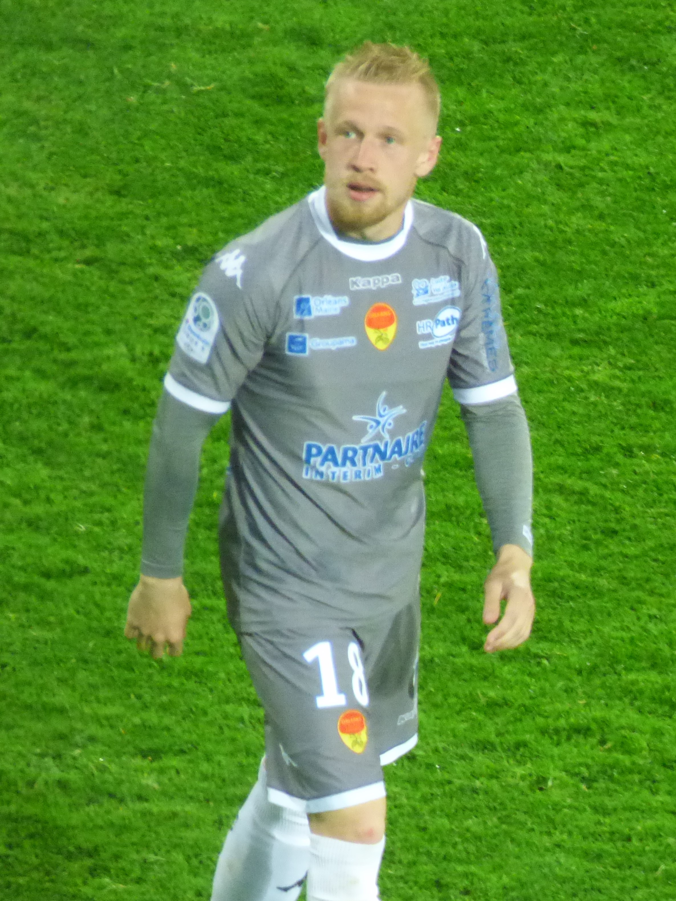 Quentin Lecoeuche après le match RC Lens / US Orléans, le 17 mai 2019, comptant pour la 38ème journée du championnat de France de football de Ligue 2 2018-2019, au Stade Bollaert-Delelis.